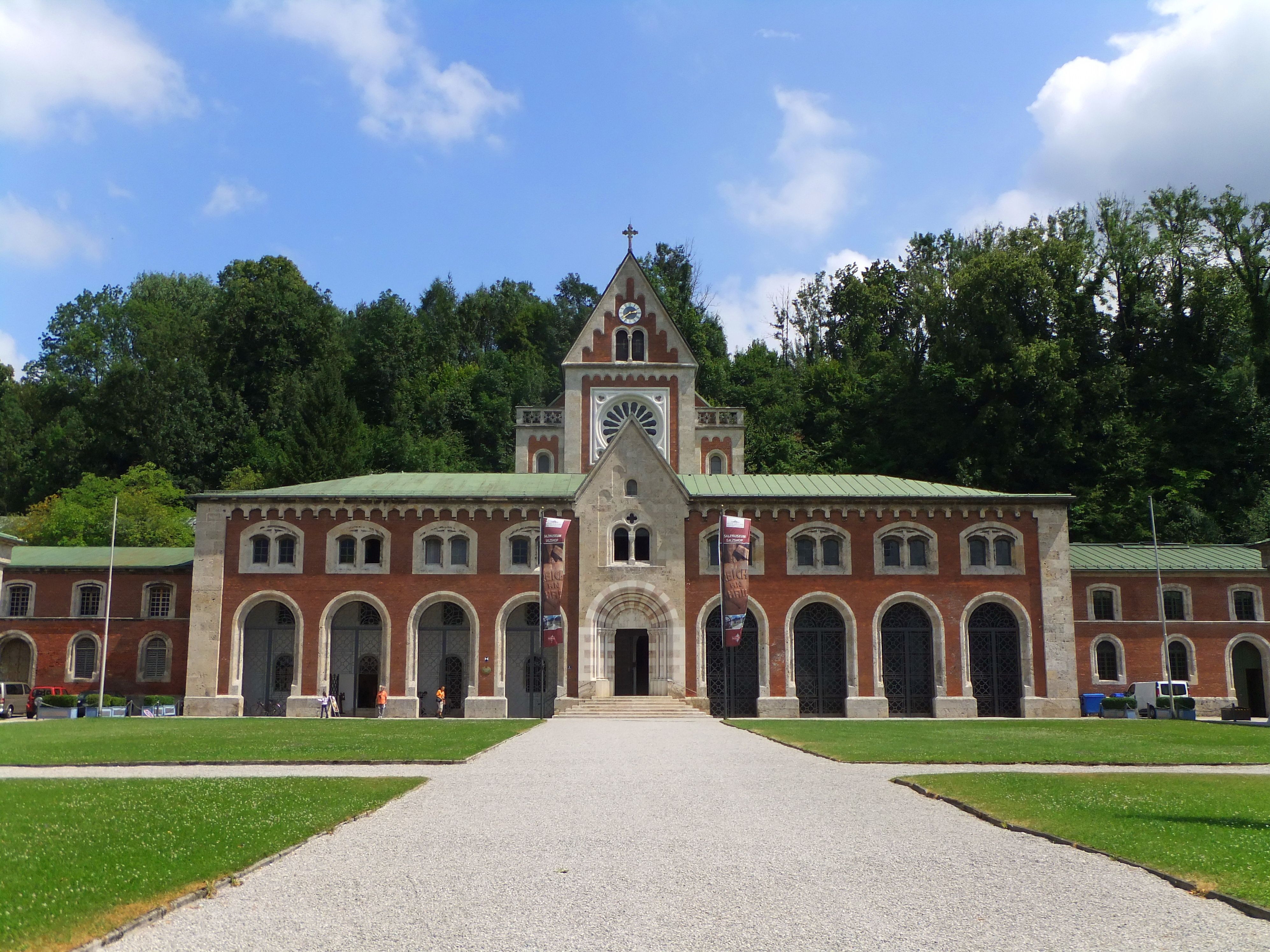 La Vecchia Salina (Alte Saline) di Bad Reichenhall, Baviera, Germania.